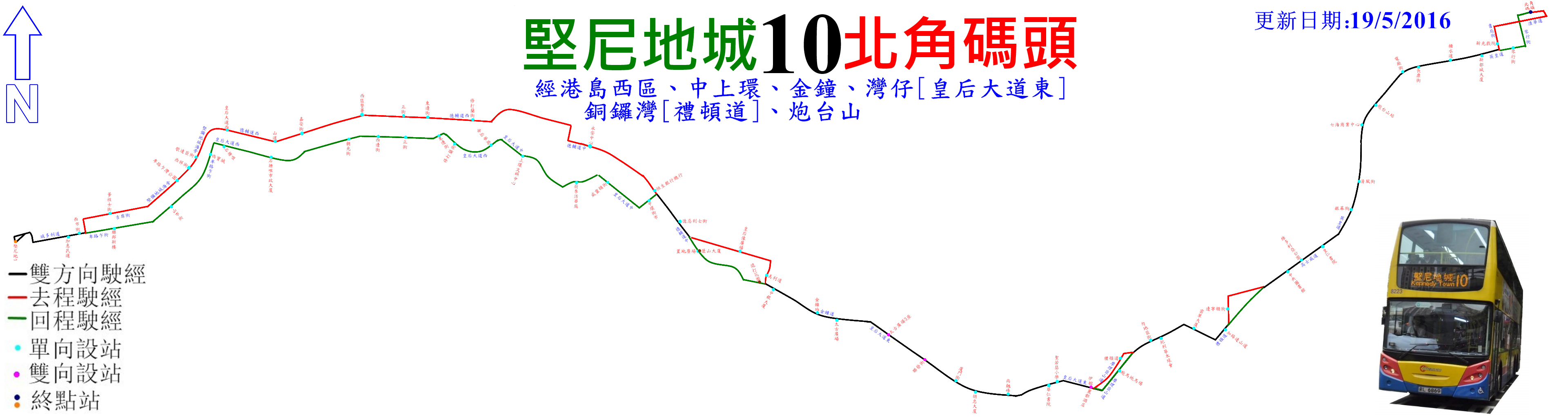 中文（香港）: 城巴10號線的走線圖